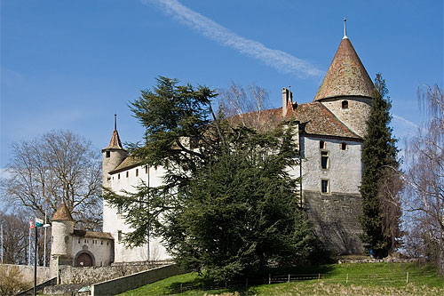 Oron-le-Châtel: Château